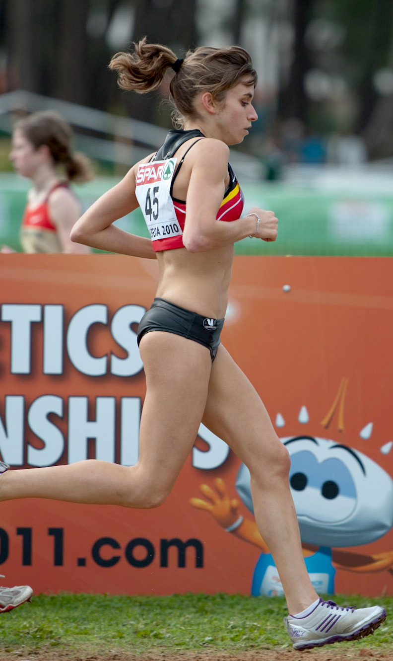 Manuela Soccol in actie tijdens het EK Cross van 2010 in Albufeira